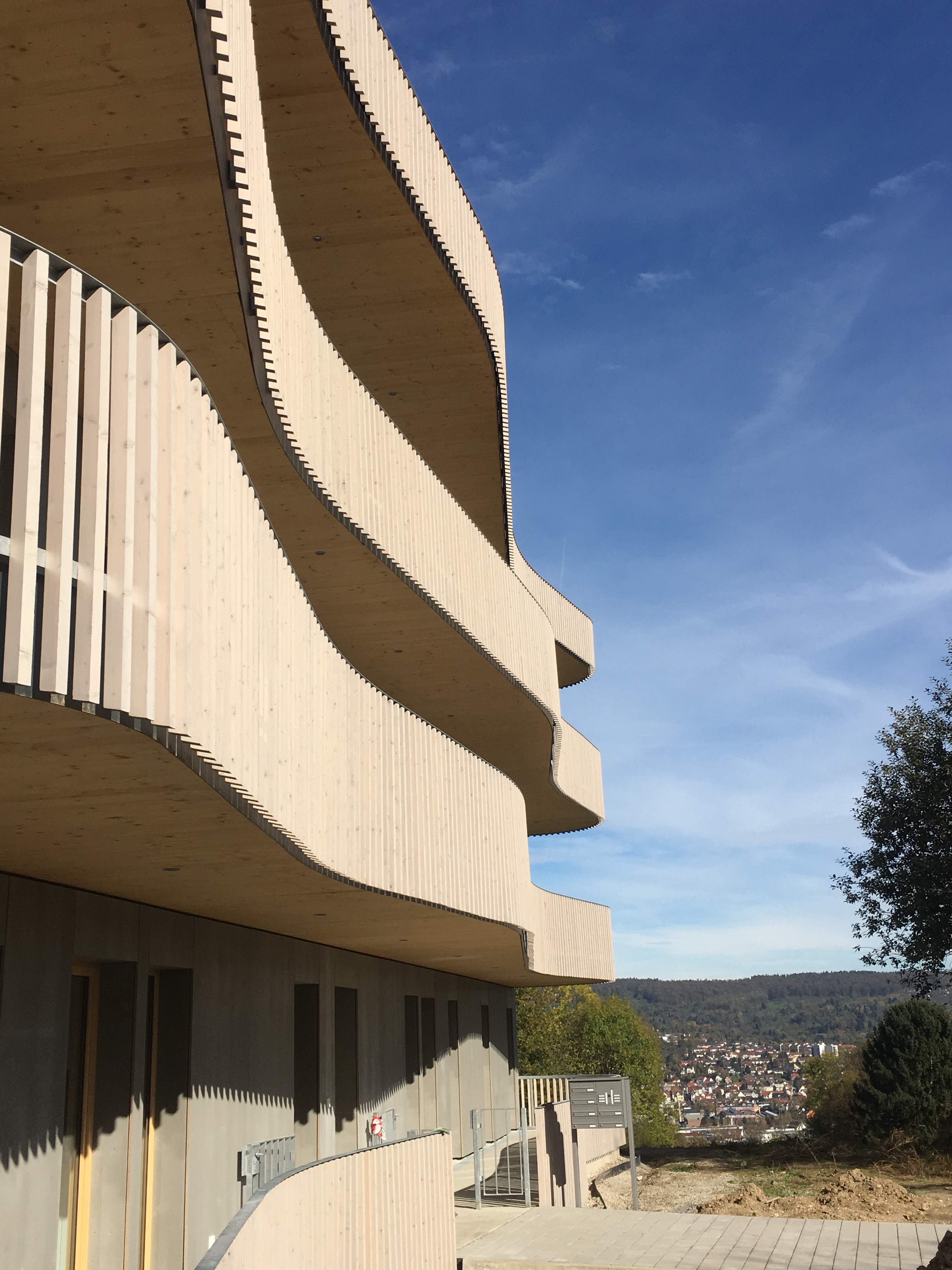 Die geschwungenen Balkone des Hoffnungshauses sollen eine Kommunikation der Bewohner über die Balkone hinweg ermöglichen.